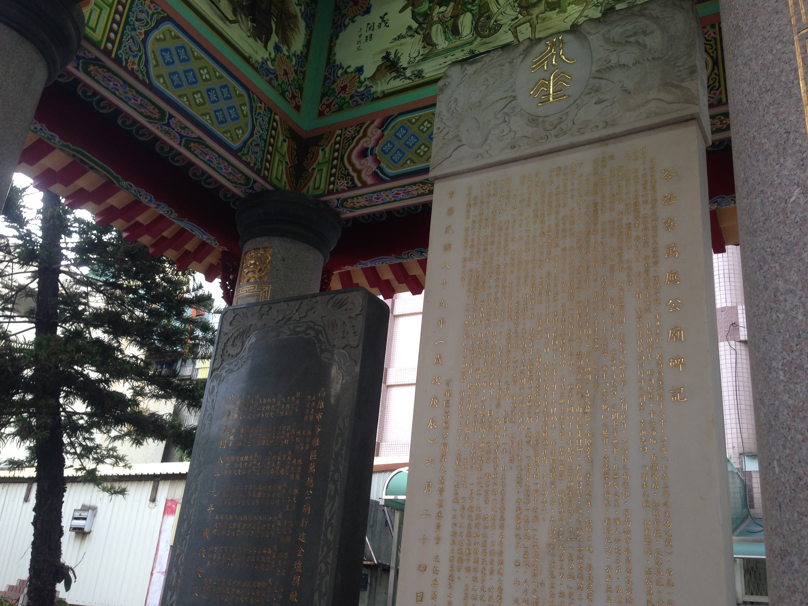 聖公媽廟碑